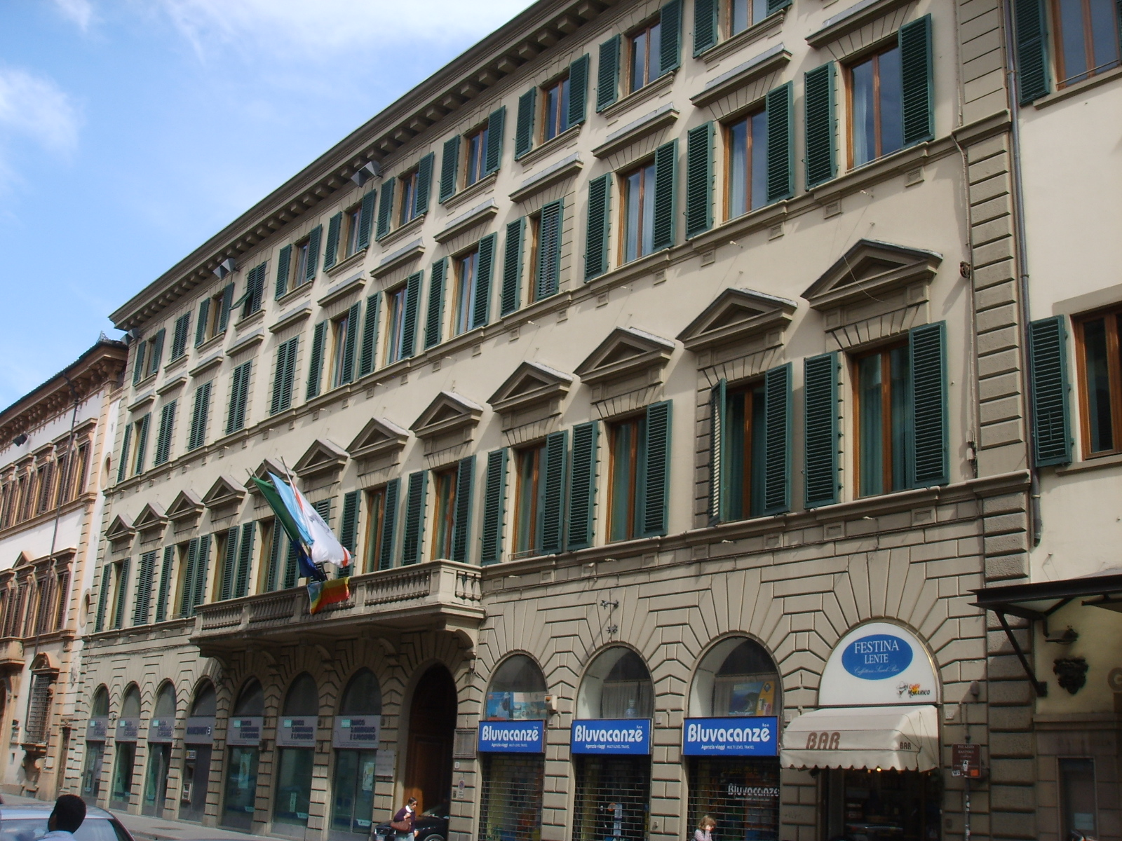 Palazzo_Bastogi florence italy